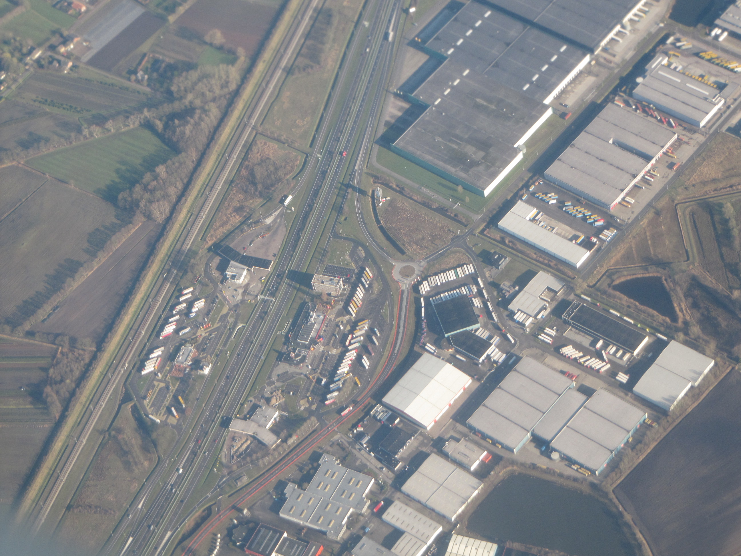 Hazeldonk